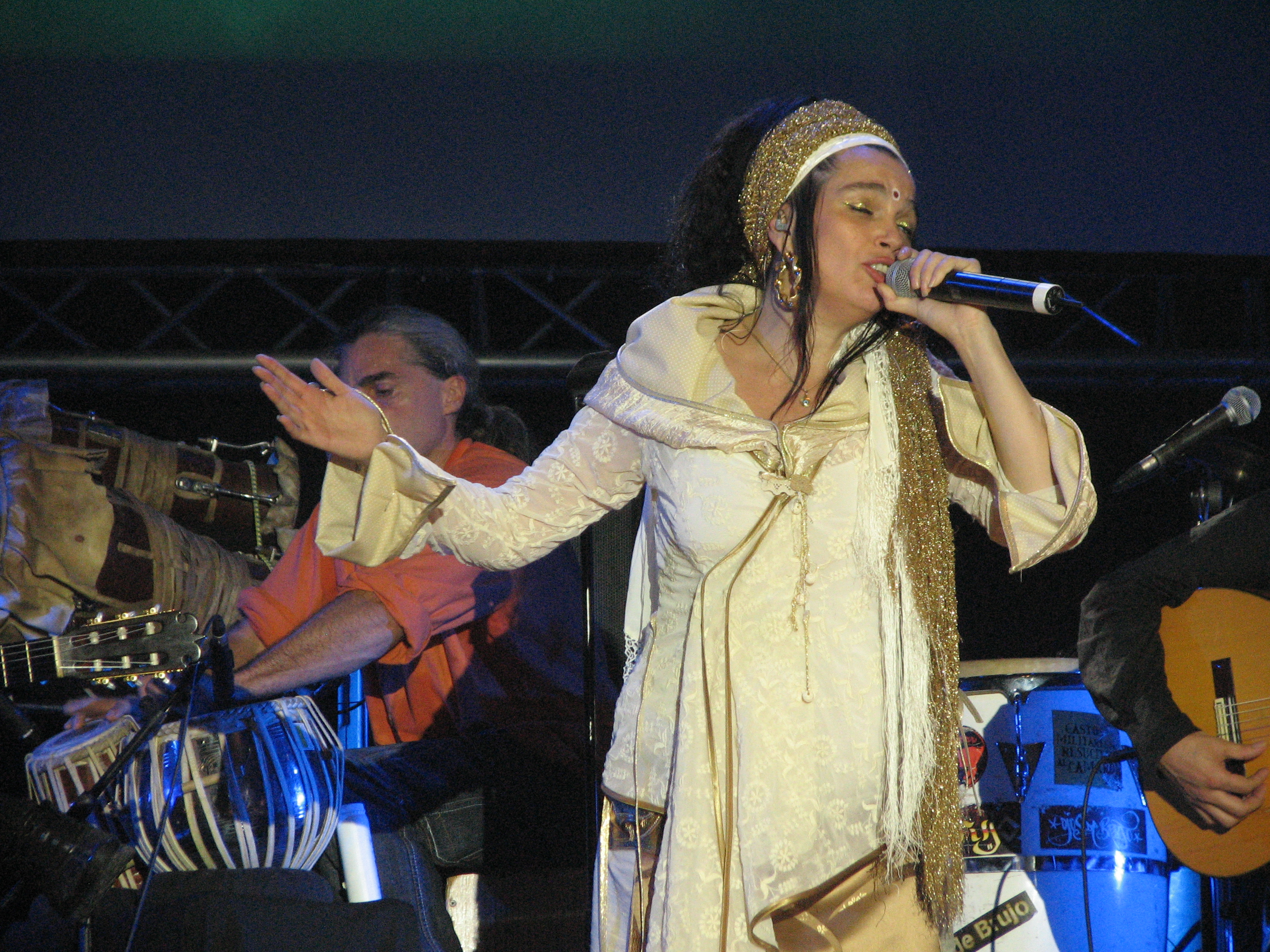 Ojos de Brujo, a band from Barcelona.